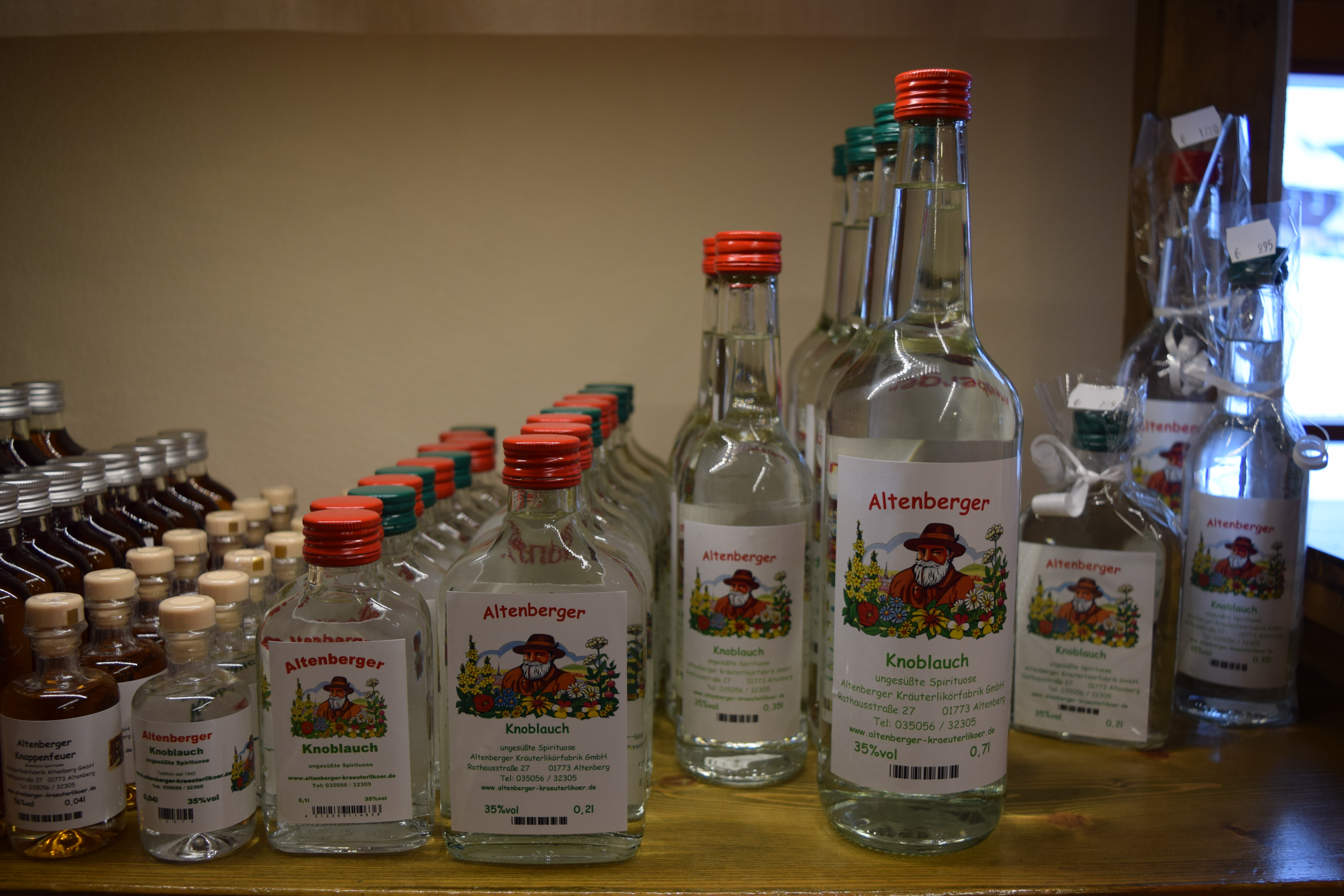 Altenberger Knoblauch